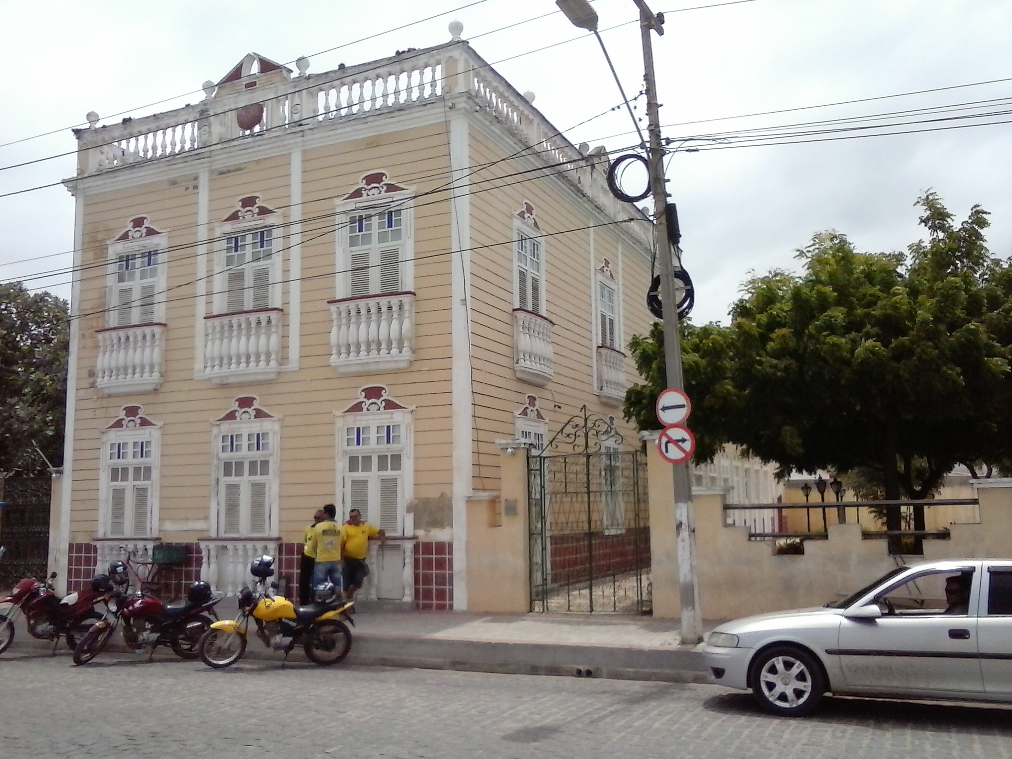 Biblioteca Pública de Aracati, Ceará, Brasil.